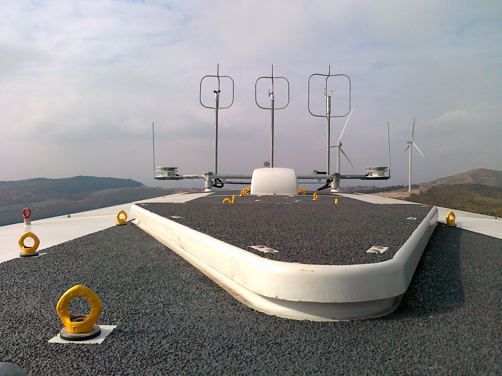 கூரை அல்லது முகடு